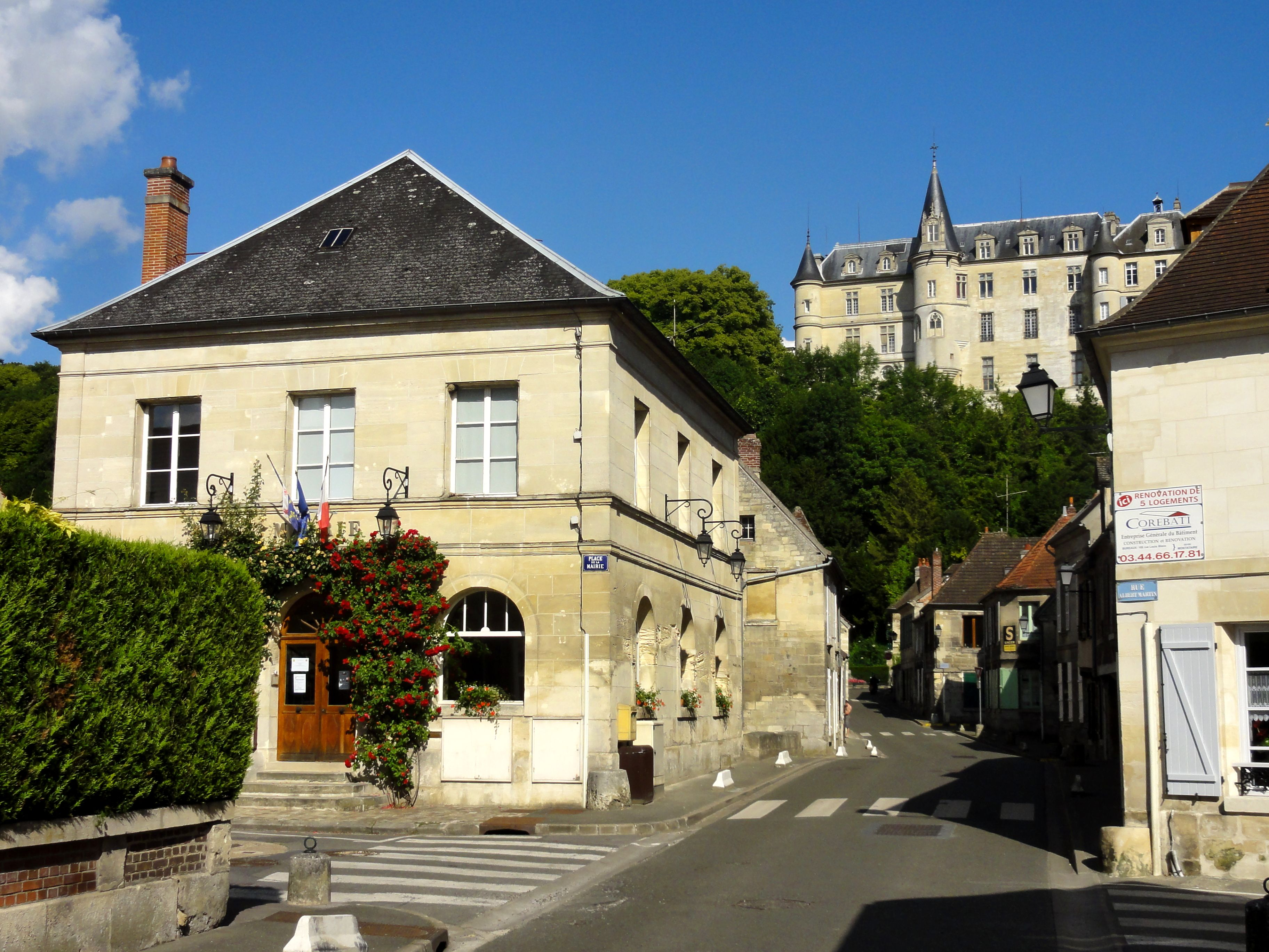 Mairie et château.